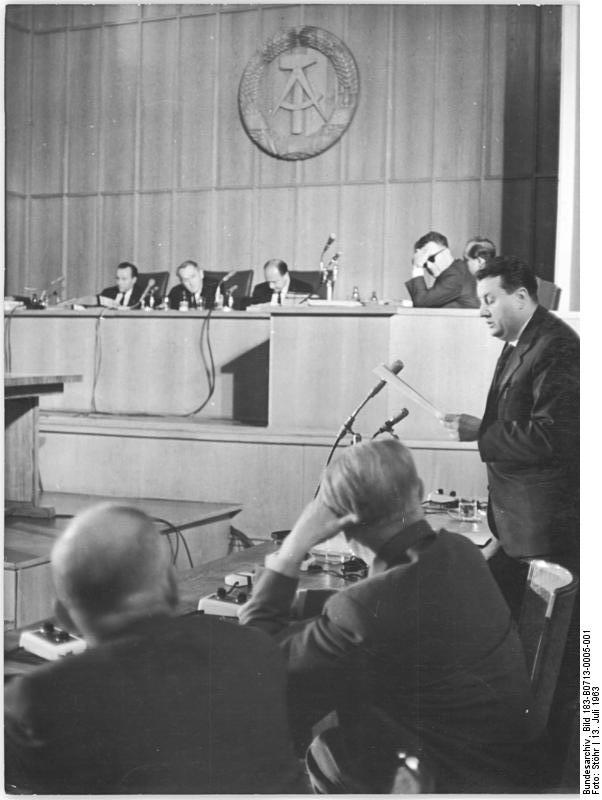 Oberstes Gericht, Globke-Prozess, Aussage, Vaclav Kral Zentralbild Stöhr-13.7.1963 Hauptverhandlung gegen Globke fortgesetzt. Im Mittelpunkt des 5. Verhandlungstages der Hauptverhandlung des 1. Strafsenats des Obersten Gerichts der DDR am 12. Juli 1963 stand der Komplex der unter maßgeblicher Mithilfe des Angeklagten von den Faschisten begangenen Germanisierungsverbrechen. UBz: Der tschechoslowakische Sachverständige Dr. Vaclav Kral von der Akademie der Wissenschaften in Prag, behandelte in seinem Gutachten die mit dem Namen Globke eng verknüpfte Politik Hitler - Deutschlands zur Zerschlagung des tschechoslowakischen Staates. Er wies weiter nach, daß Globke im Zuge der Ausrottungsziele durch die Partei-Kanzlei in München beauftragt war, die Fragen der Protektoratszugehörigkeit zumindest so zu klären, daß verhaftete Widerstandskämpfer zum Tode verurteilt werden konnten.